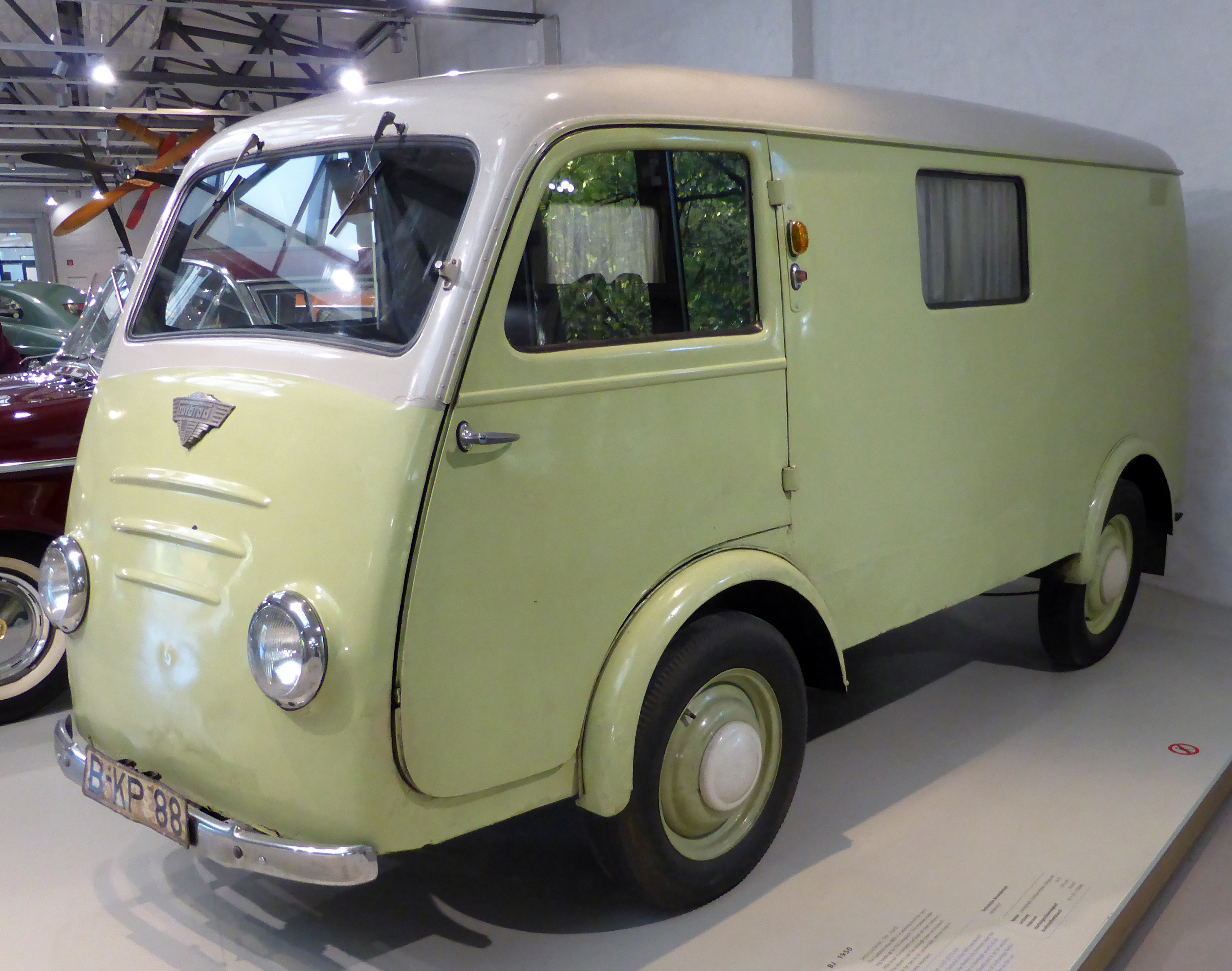 Gutbrod Atlas 800, Baujahr 1950. Ausgestellt im Deutschen Technikmuseum in Berlin. Wikipedianische KulTour am 10. Oktober 2015 in der Ausstellung des Museums.